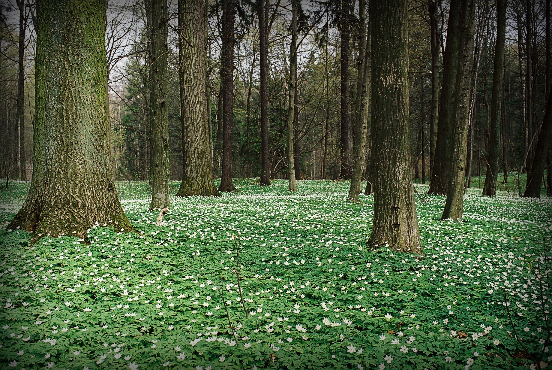 Autor: Adrian Grzegorz Rok utworzenia: 2005